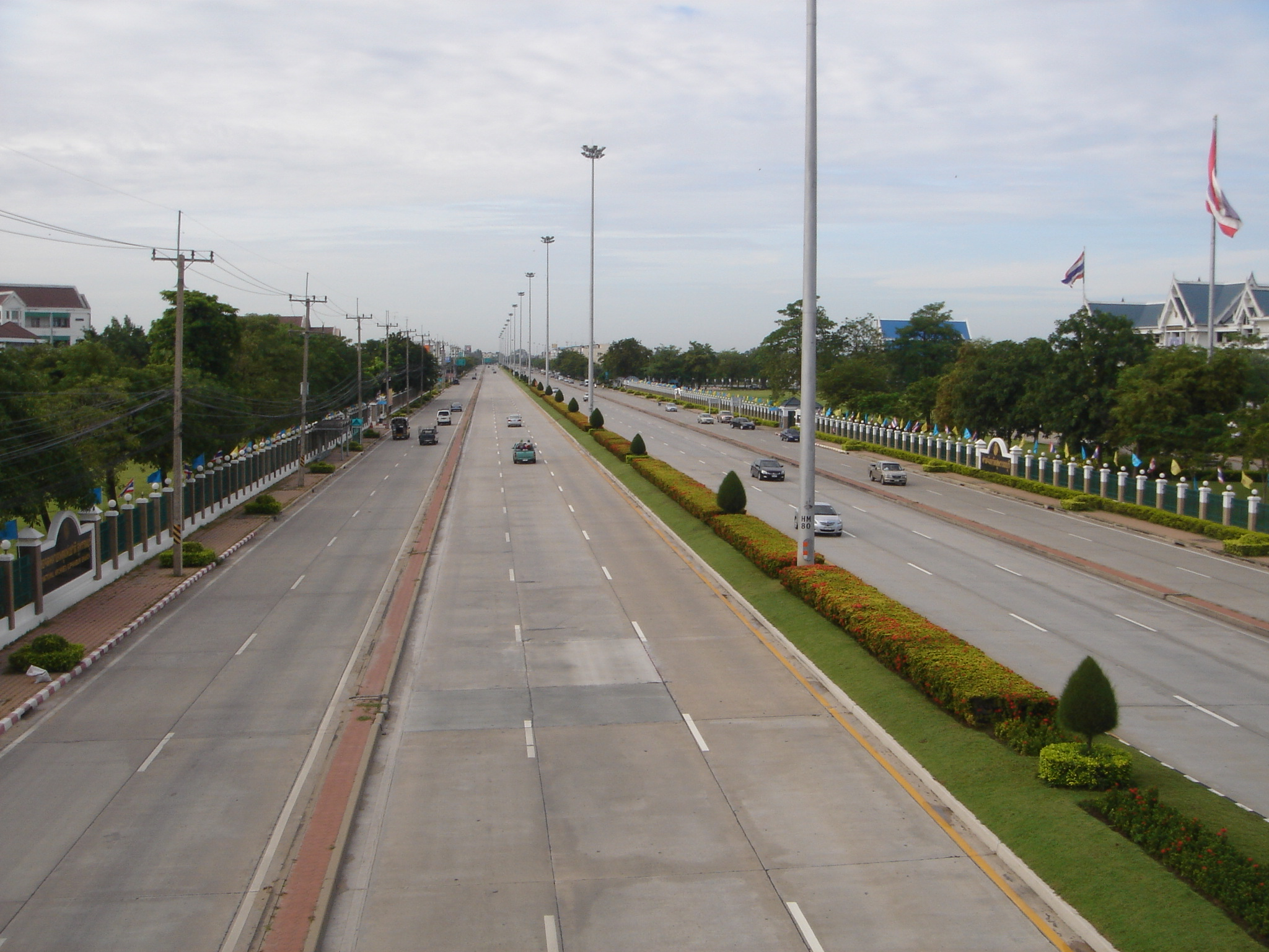 ทางหลวงหมายเลข 340 หน้าศาลากลางจังหวัดสุพรรณบุรี